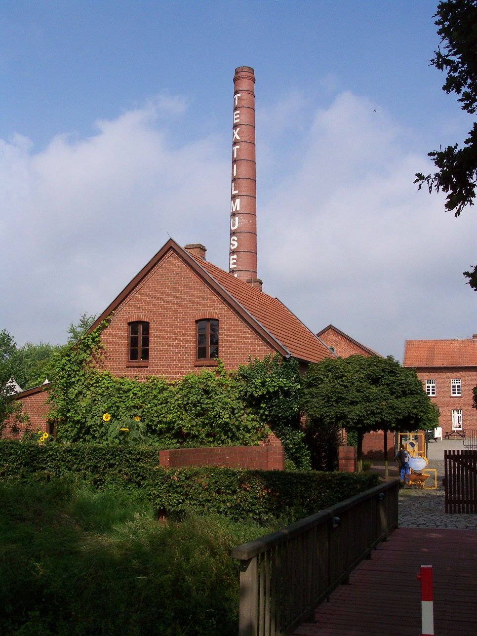 Textilmuseum Bocholt Eingang